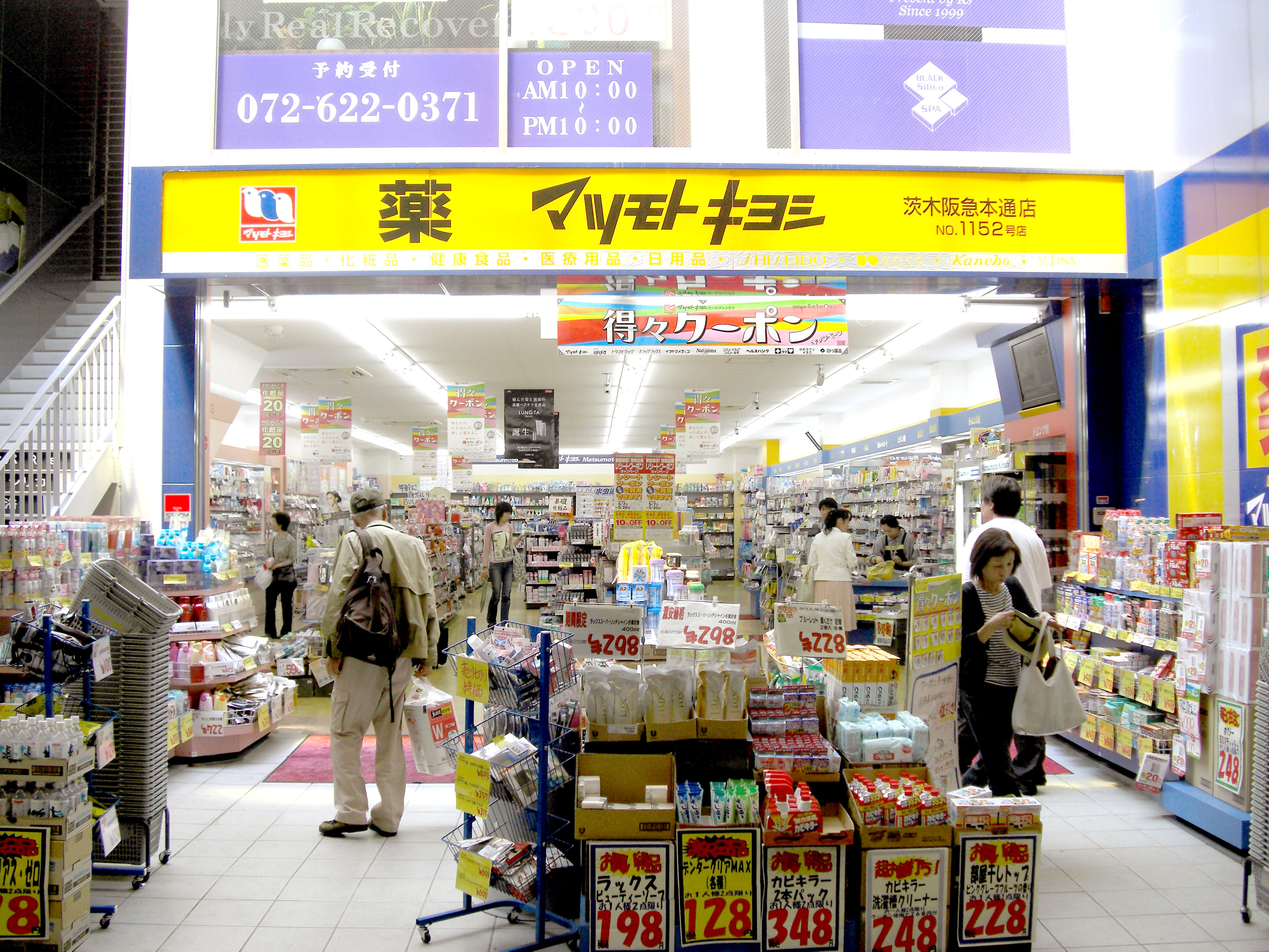 Matsumoto Kiyoshi Ibaraki Hankyu Hondori,Betsuincho Ibaraki-city Osaka Japan.